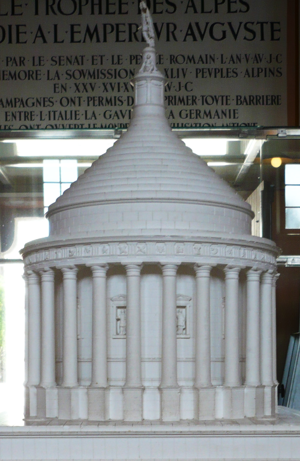 Trapaeum Alpium